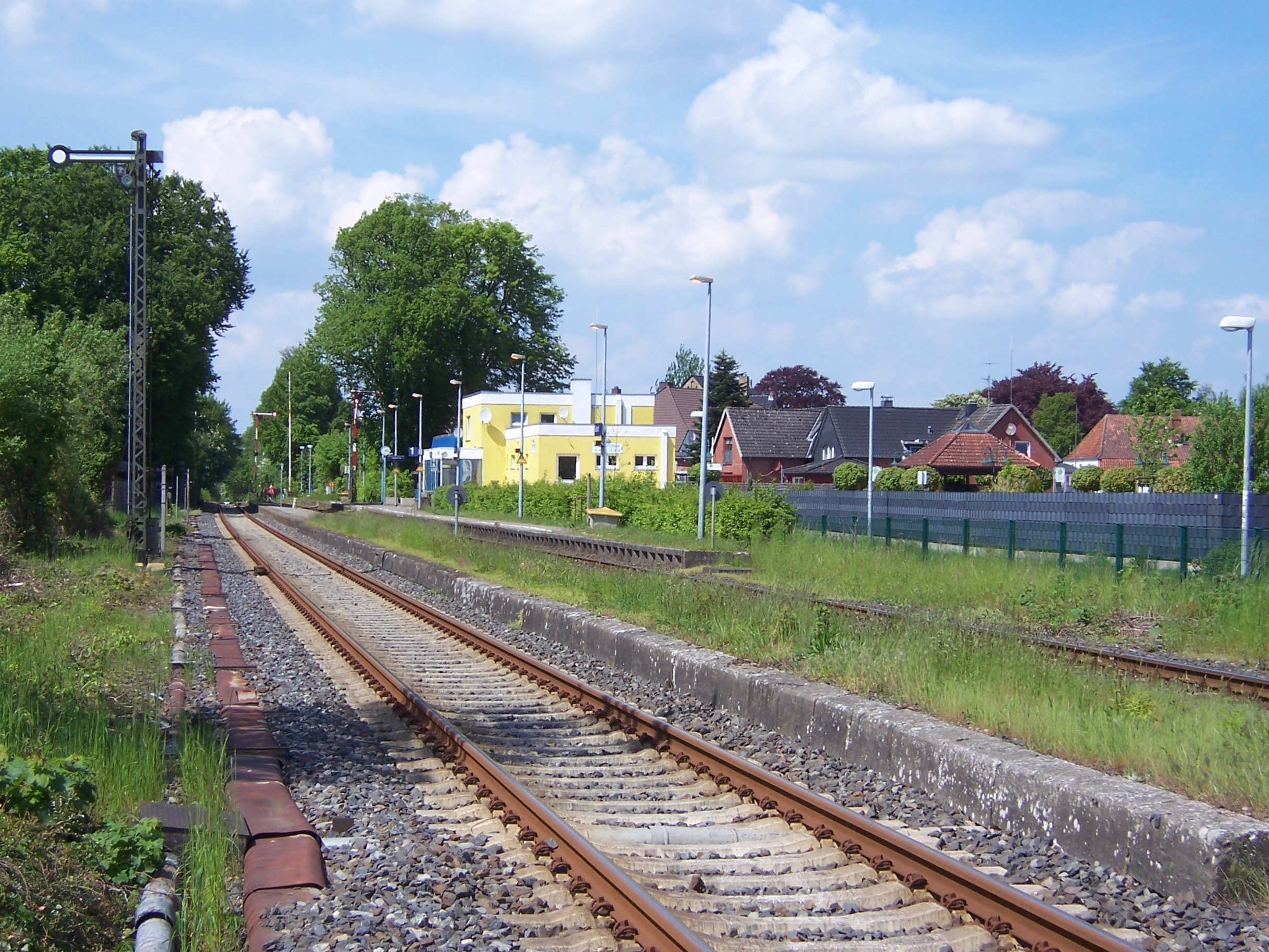 Bahnhof Gettorf Bahnsteigseite